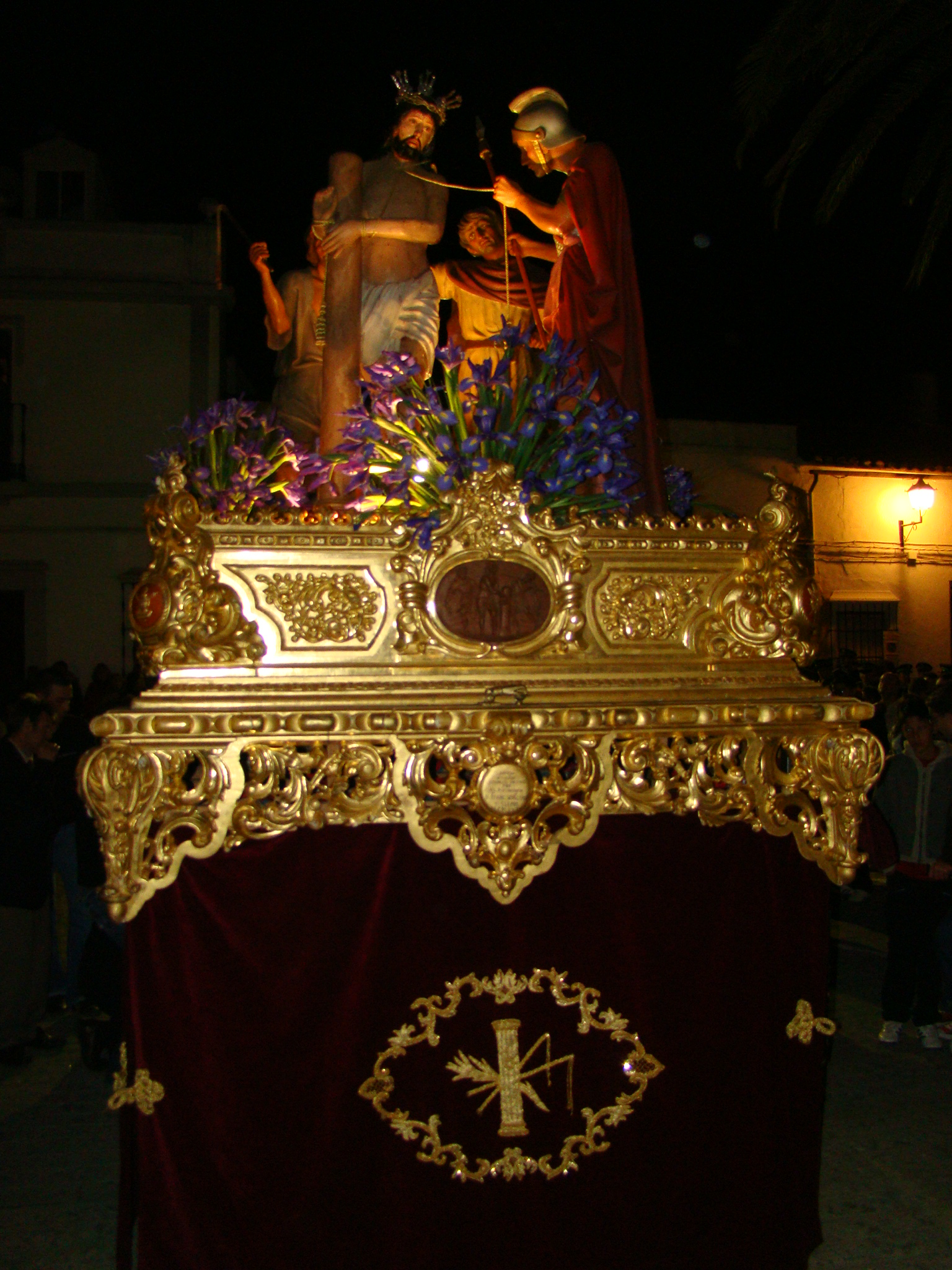 PASO DE LA SEMANA SANTE DE FREGENAL